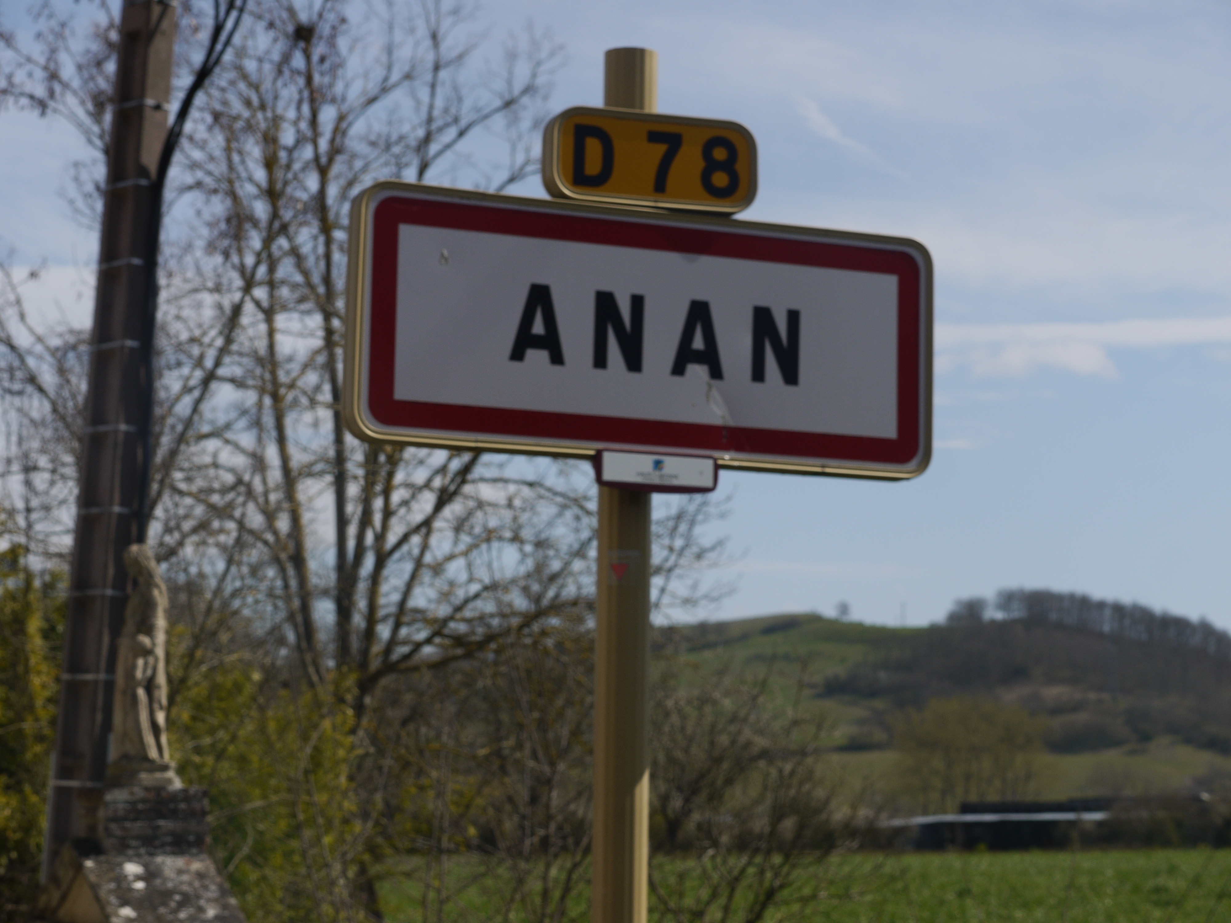 Panneau d'entrée ouest d'Anan sur la D78.